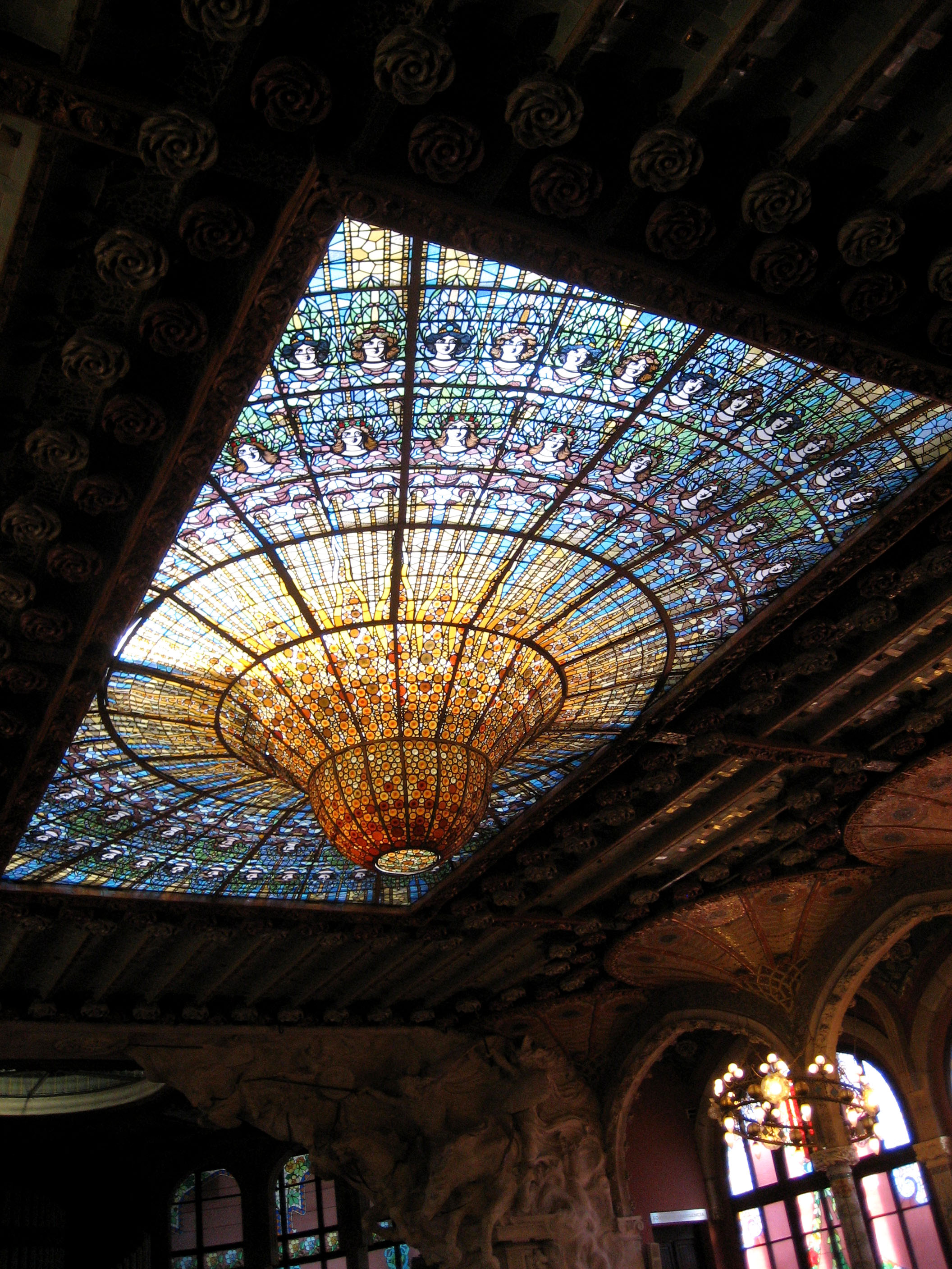 Lámpara sobre la sala de conciertos del Palau de la Música Catalana en Barcelona